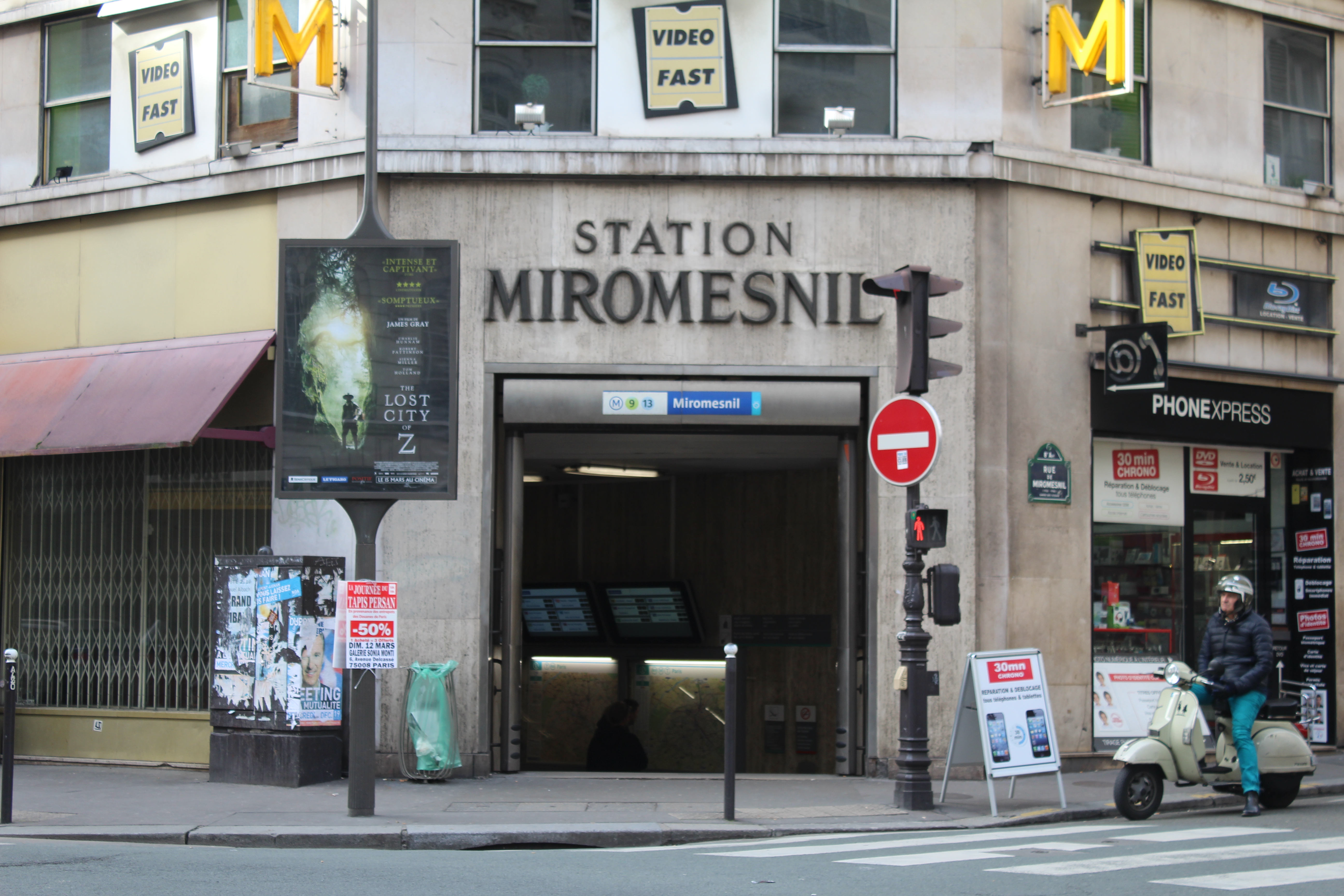 Entrée de la station de métro Miromesnil à Paris.